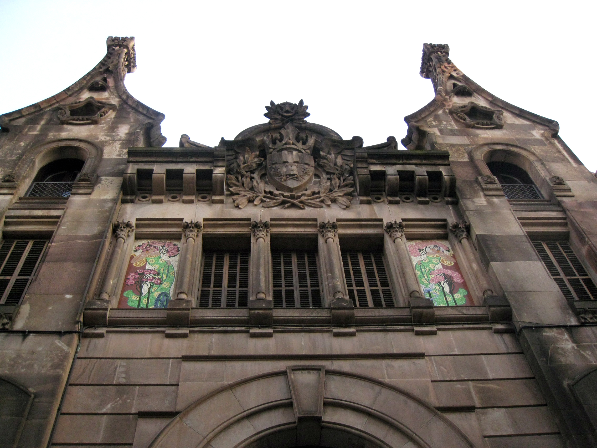 Casa Soteras, antic Banc de Terrassa, al carrer de Sant Jaume núm. 26 (Terrassa). Edifici modernista de Salvador Soteras del 1909. Vista de la part alta de l'edifici, amb mosaics al·lusius a la indústria i el comerç.